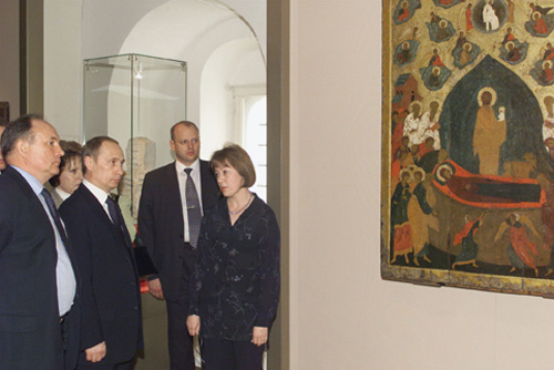 ВОЛОГДА. В художественном отделе Вологодского государственного музея-заповедника.